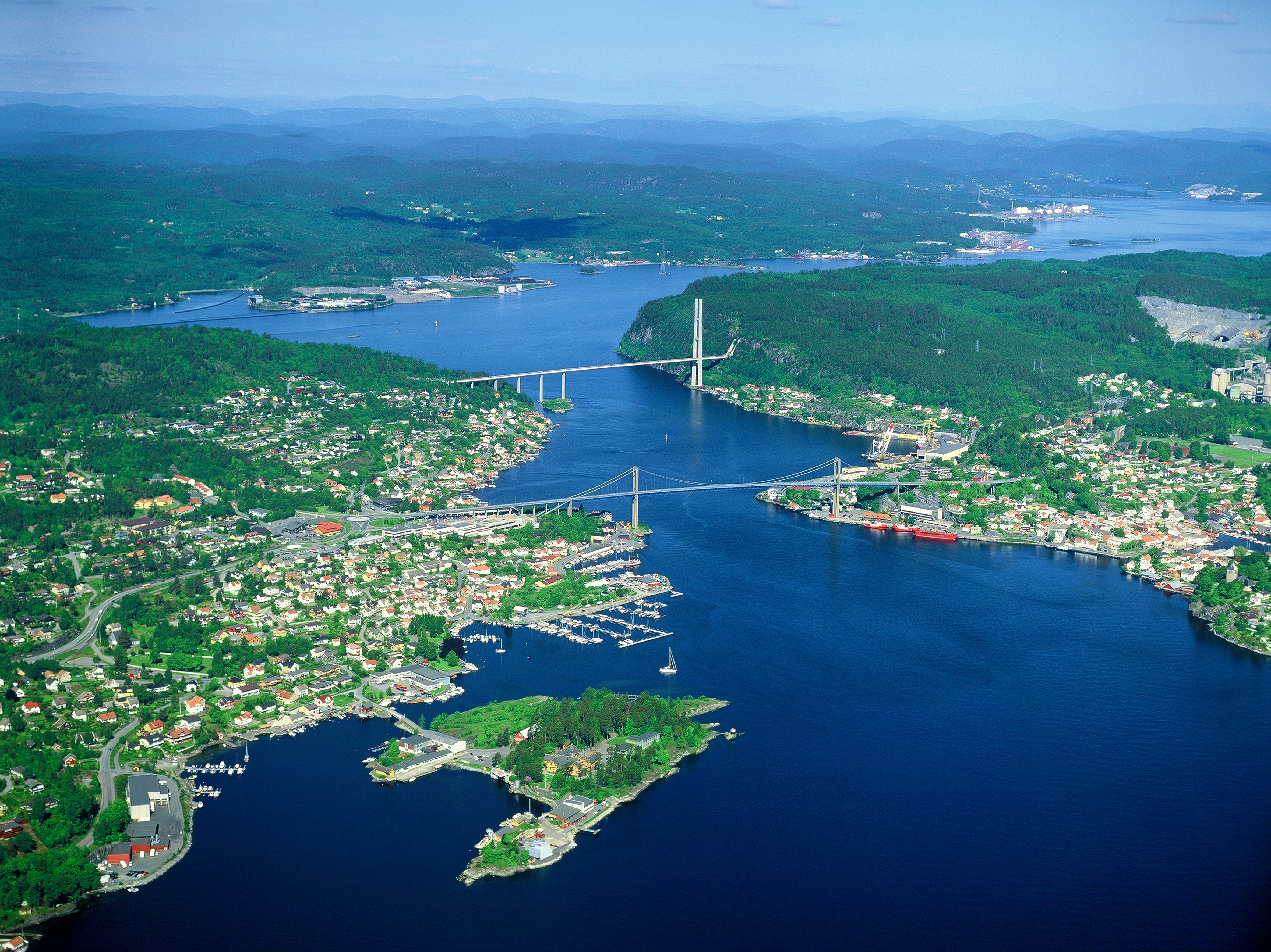 Stathelle til venstre og Brevik til høyre. Europavei 18 over Grenlandsbrua (bakerst). Frierfjorden i bakgrunnen og Langesundfjorden i forgrunnen.